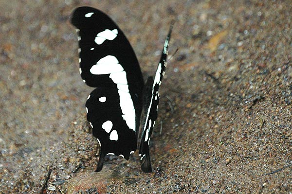 Papilio hesperus Bwindi SW Uganda